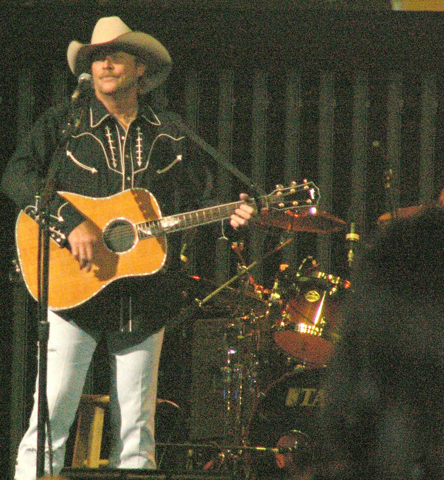 Alan Jackson